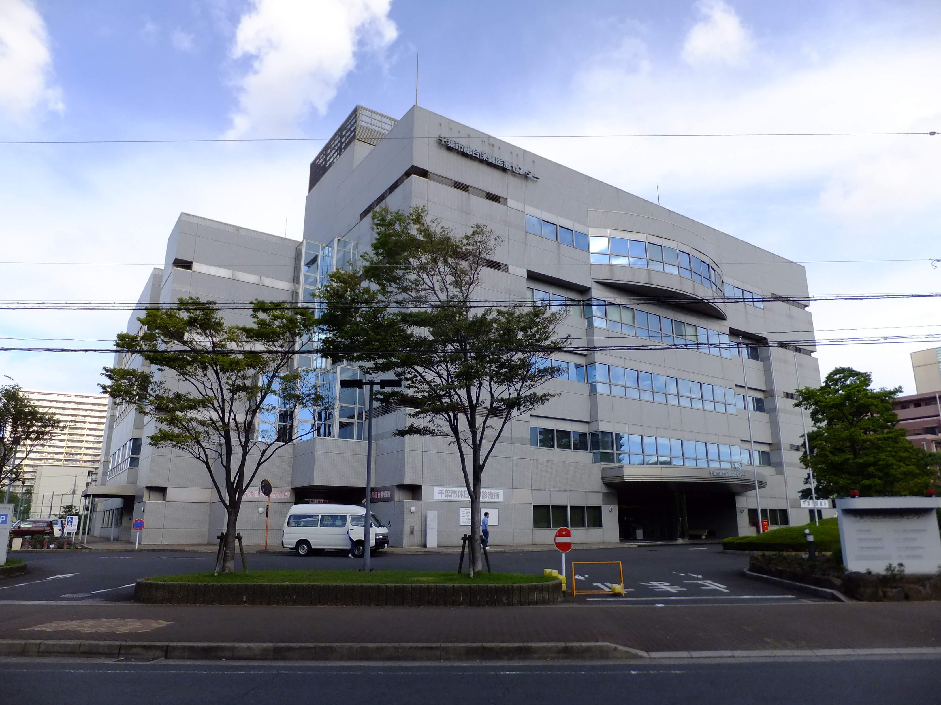 千葉市総合保健医療センター（千葉市中央区）。千葉市保健所、千葉市休日救急診療所、千葉市環境保健研究所等からなる保健施設・医療施設である。